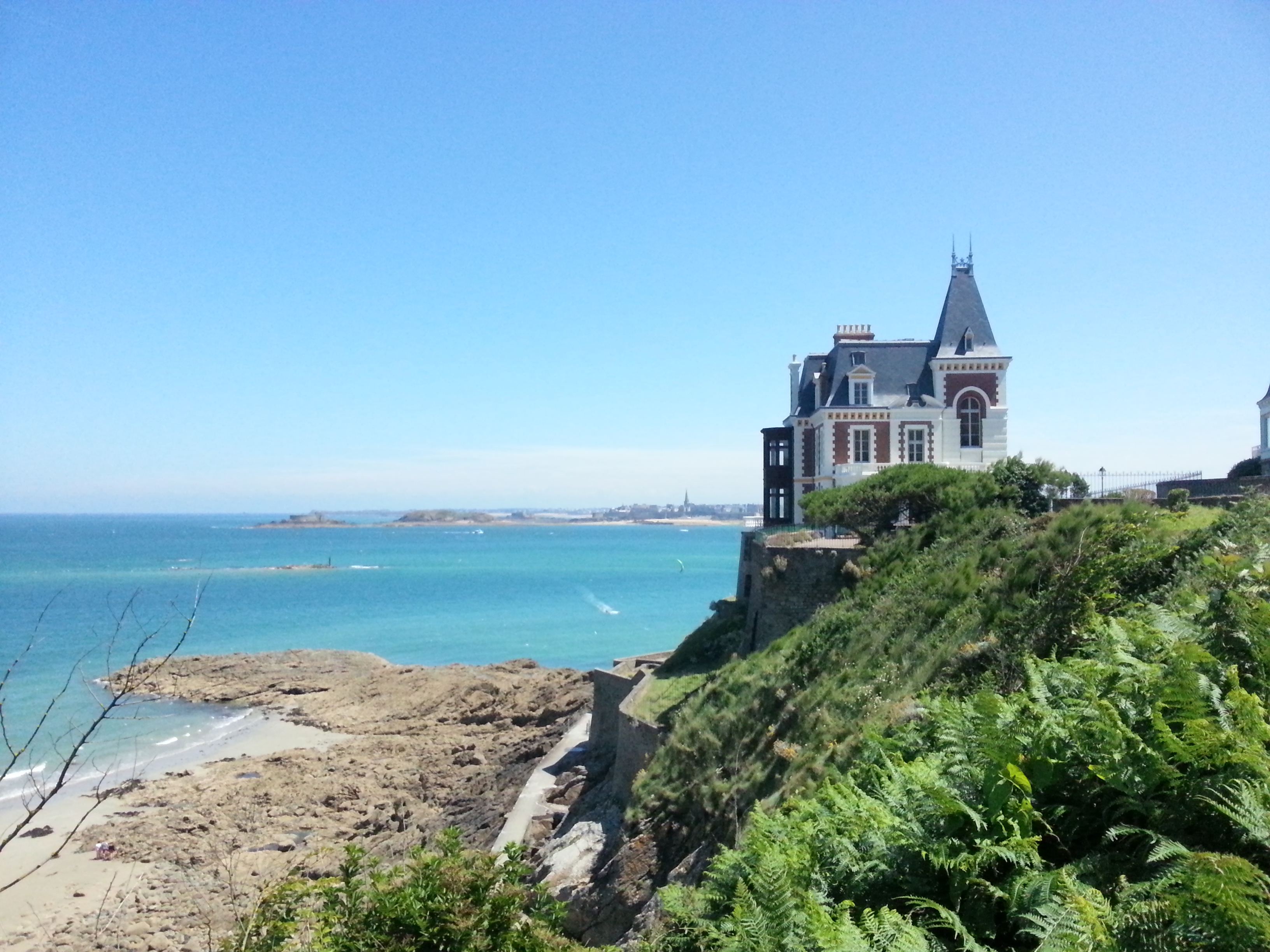 La Villa Roches Brunes, rénovée dans son apparence d'origine